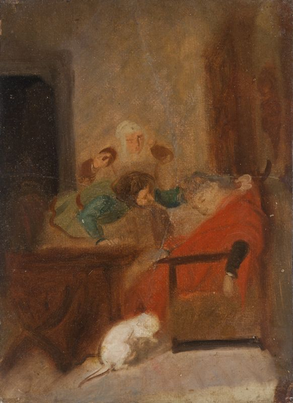 Enrico Pollastrini, Morte di Giovanni Boccaccio, Olio su carta applicata a tela, 24 × 17.5 cm (9.4 × 6.9 in).